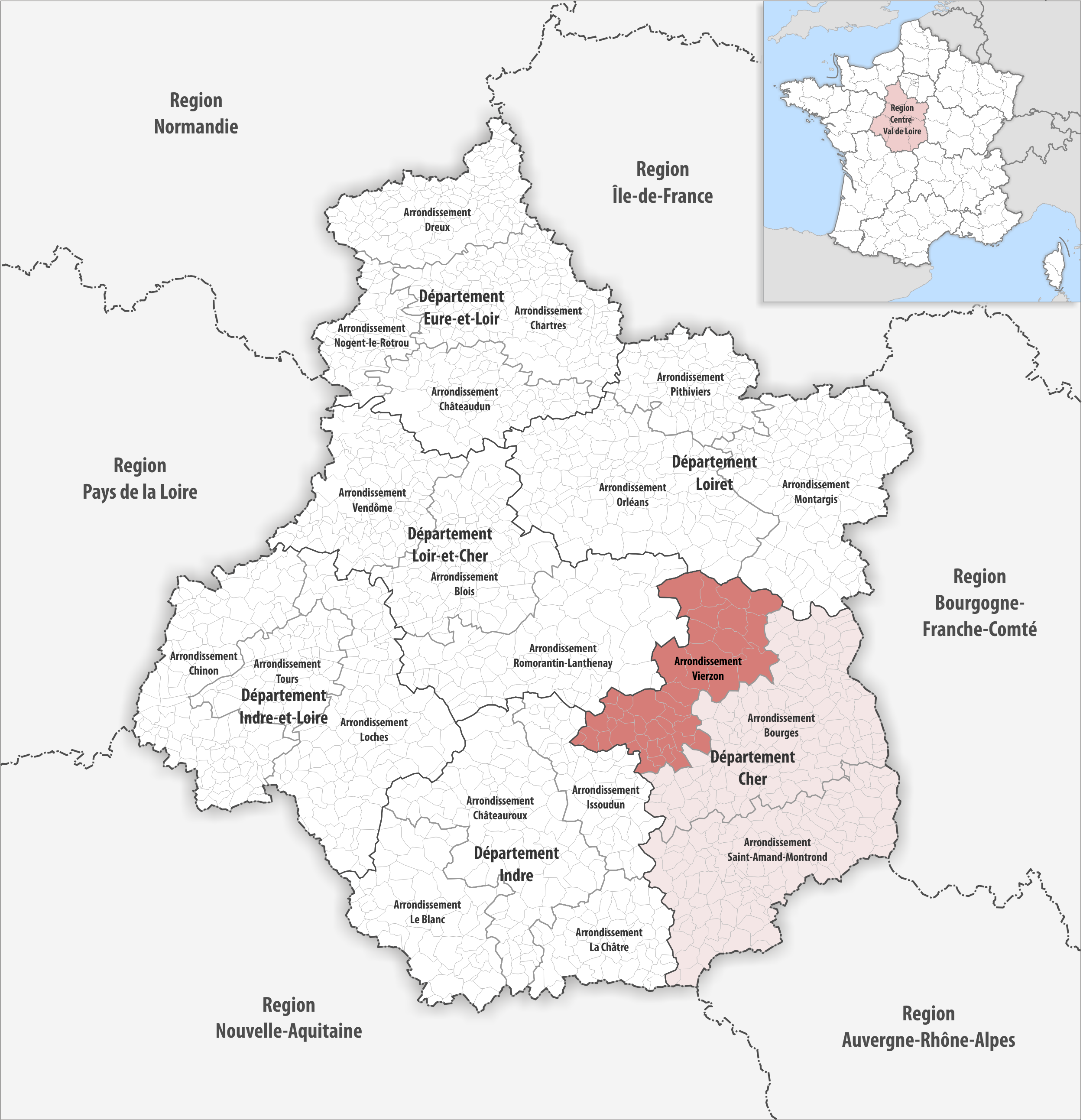 Lage des Arrondissements Vierzon